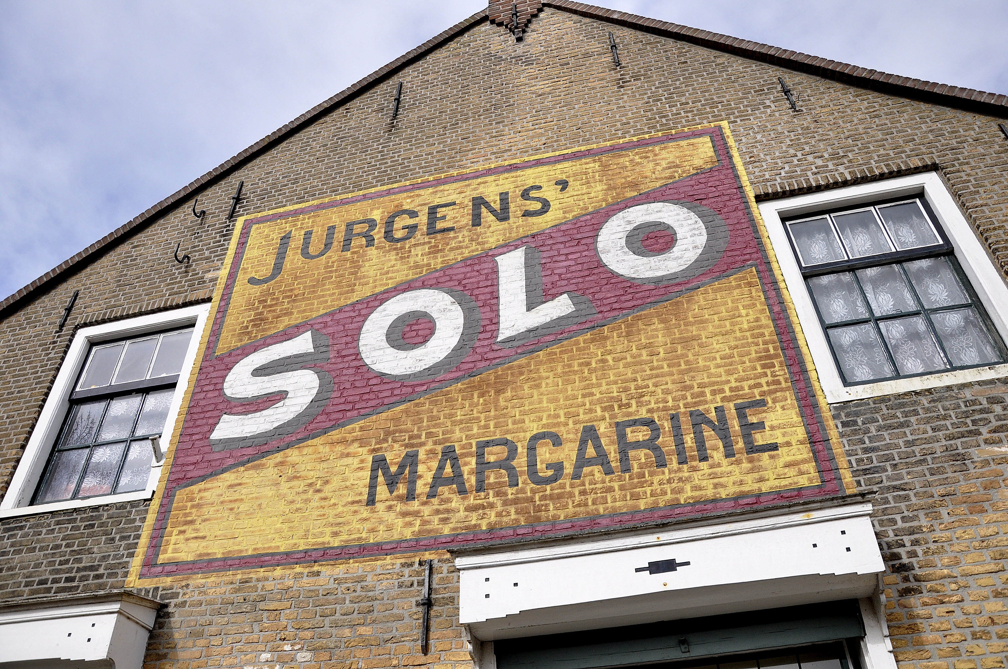 Gevelreclame uit 1907 te Dreischor, Nederland, voor Solo margarine van Jurgens (Antoon Jurgens).